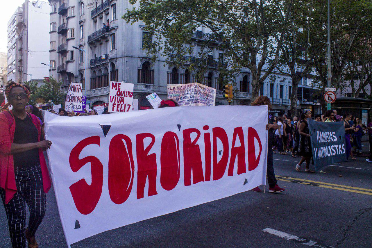 Salida de La Melaza y Afrogama con mujeres afro y candomberas.